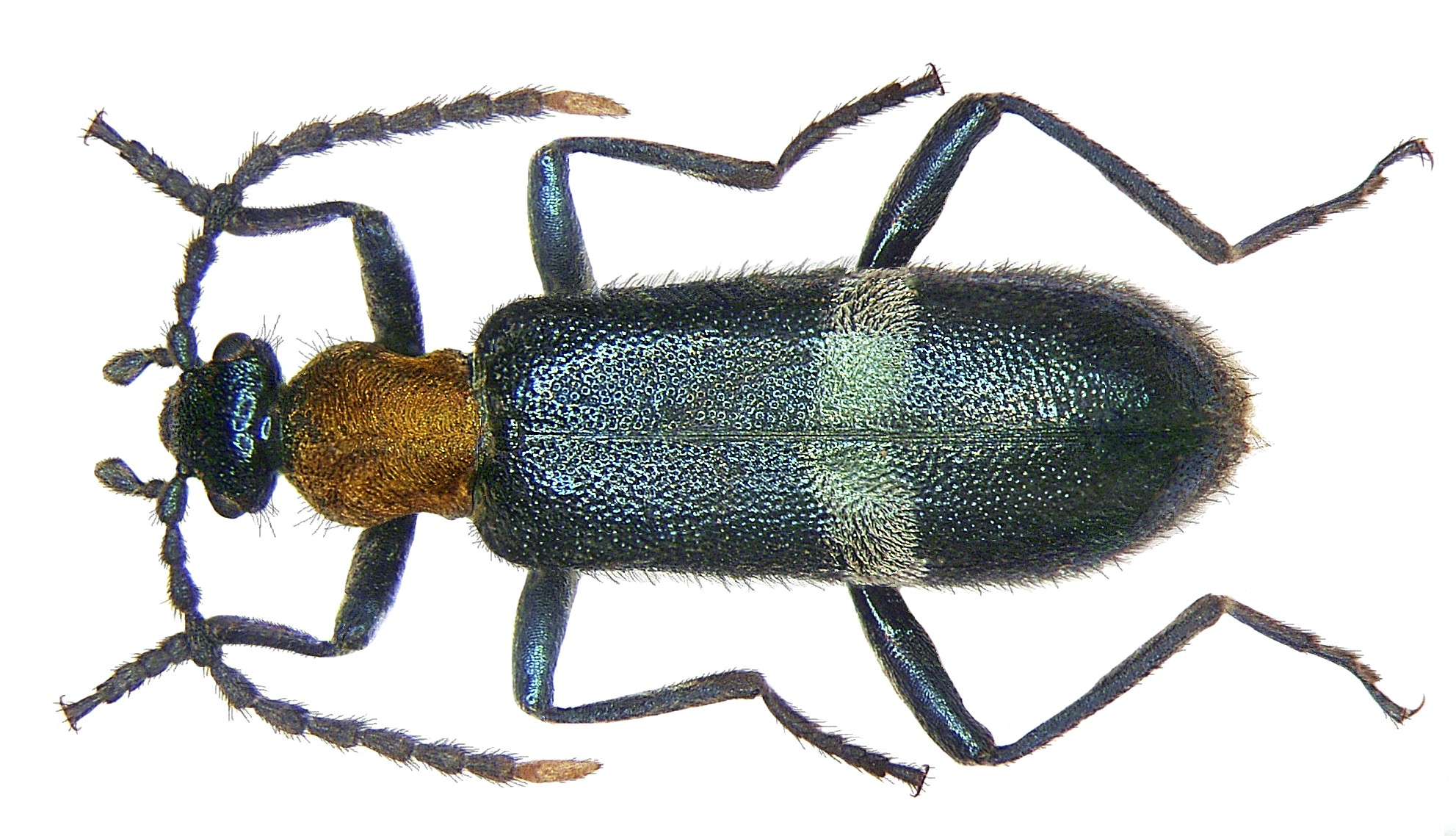 Familie: Anthicidae Grösse: 9 mm Fundort: Indonesien, Irian Jaya, Ransiki leg. A.Skale, 2007; det. D.Telnov, 2008 Foto: U.Schmidt, 2008